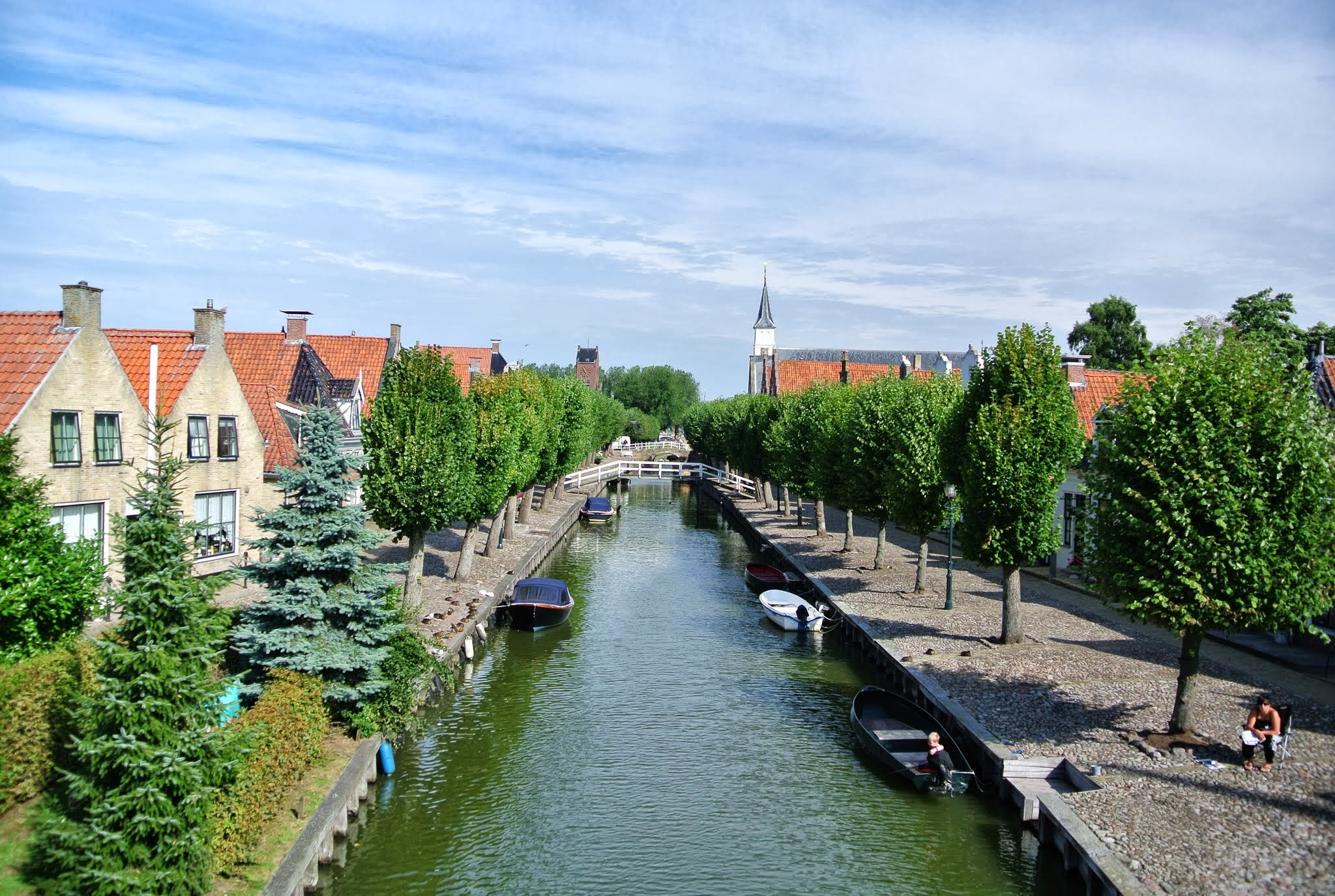 8556 Sloten, Netherlands